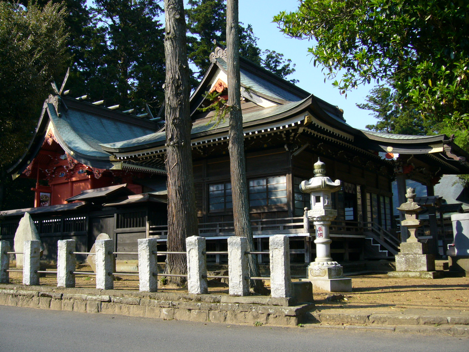 oto-shrine,katori-city,japan